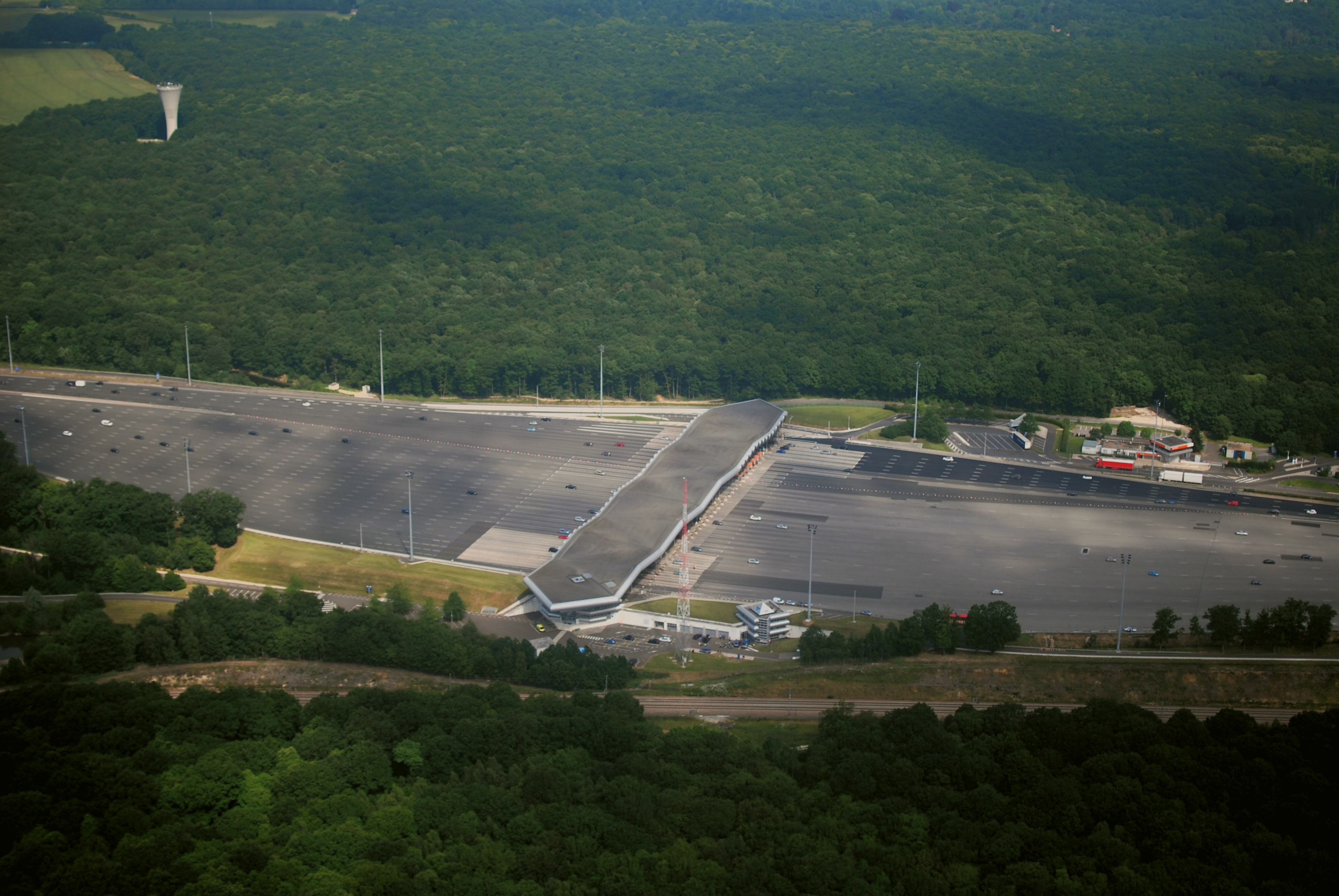 Photographie aérienne du péage de Saint-Arnoult-en-Yvelines